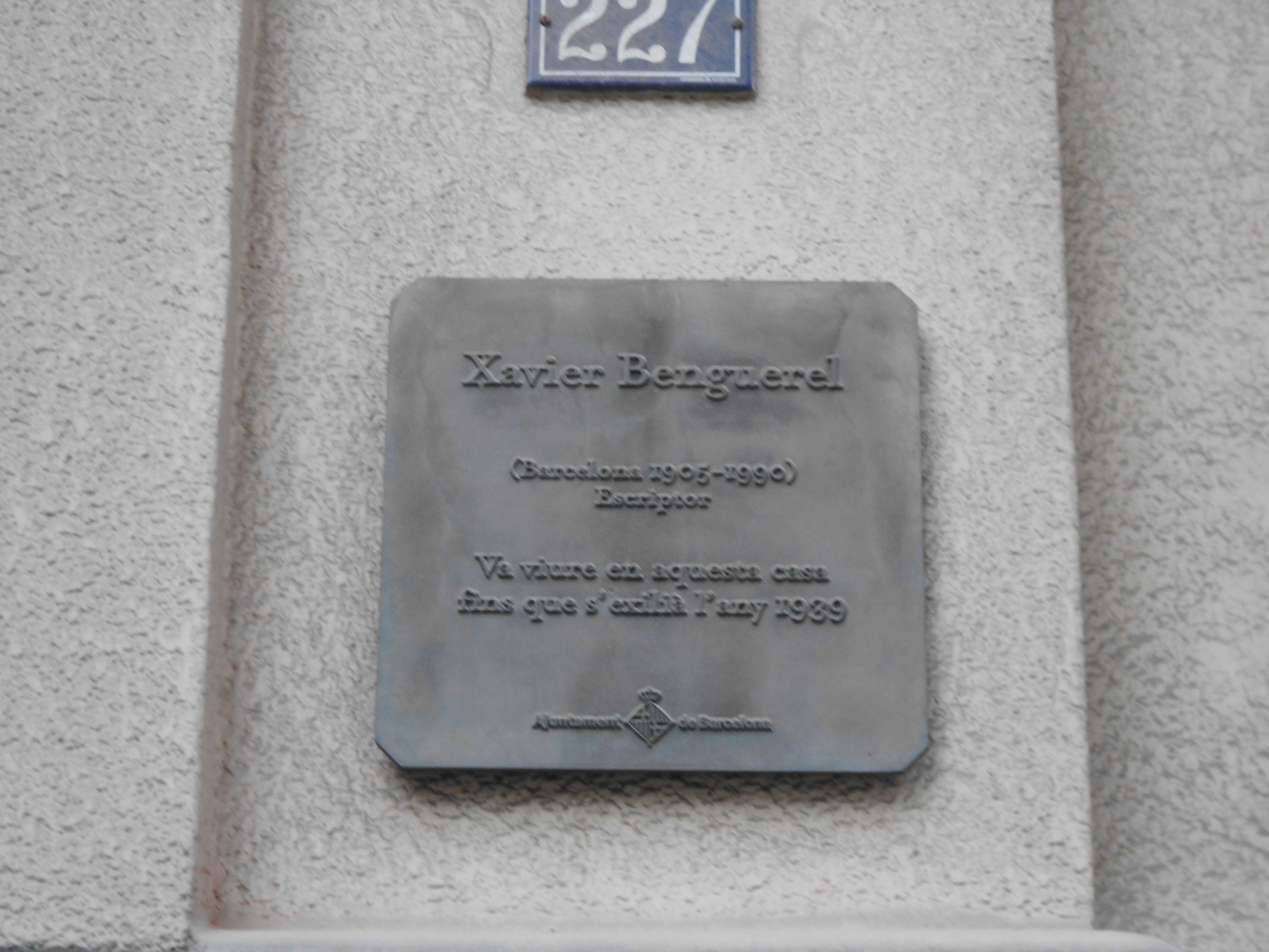 Xavier Benguerel. Rambla del Poblenou, 104 (Barcelona)